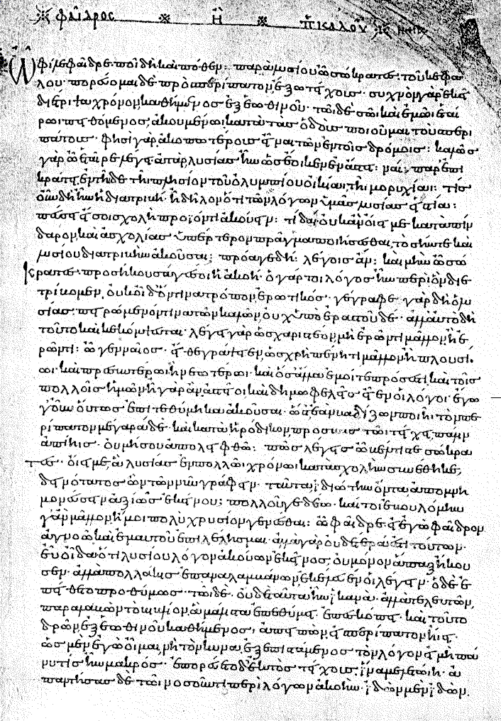 Miniscule parchment containing the beginning of Phaedrus in Codex Clarkianus 39 in the Bodleian Library. The minuscule was written for Arethas of Patras (later of Caesarea), one of the most important figures in the history of Byzantine books. It was bought by Dr. E.D. Clarke in 1802 from the monastery of St. John on Patmos. Greek text (first lines): Ὦ φίλε Φαῖδρε. ποῖ δὴ καὶ πόθεν: παρά Λυσίου ὦ Σώκρατες, τοῦ Κεφάλου∙ πορεύομαι δὲ πρὸς περίπατον ἔξω τείχους∙ συχνὸν γὰρ ἐκεῖ διέτριψα χρόνον, καθήμενος ἐξ ἐωθινοῦ∙ τῶι δὲ σῶι καὶ ἐμῶι ἐταίρωι πειθόμενος, Ἀκουμένωι, κατὰ τὰς ὁδοὺς ποιοῦμαι τοὺς περιπάτους∙ φησὶ γὰρ ἀκοπωτέρους εἶναι τῶν ἐν τοῖς δρόμοις: καλῶς γὰρ ὦ ἐταῖρε λέγει. ἀτὰρ Λυσίας ἦν ὡς ἔοικεν ἐν ἄστει: ναί, παρ᾽ Ἐπικράτει. ἐν τῆιδε τῆι πλησίον τοῦ ὀλυμπίου οἰκίαι τῆι Μορυχίαι